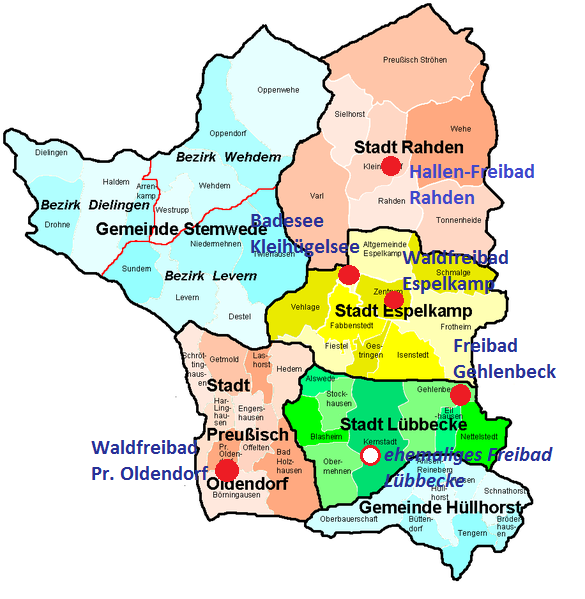 Freibäder im Altkreis Lübbecke